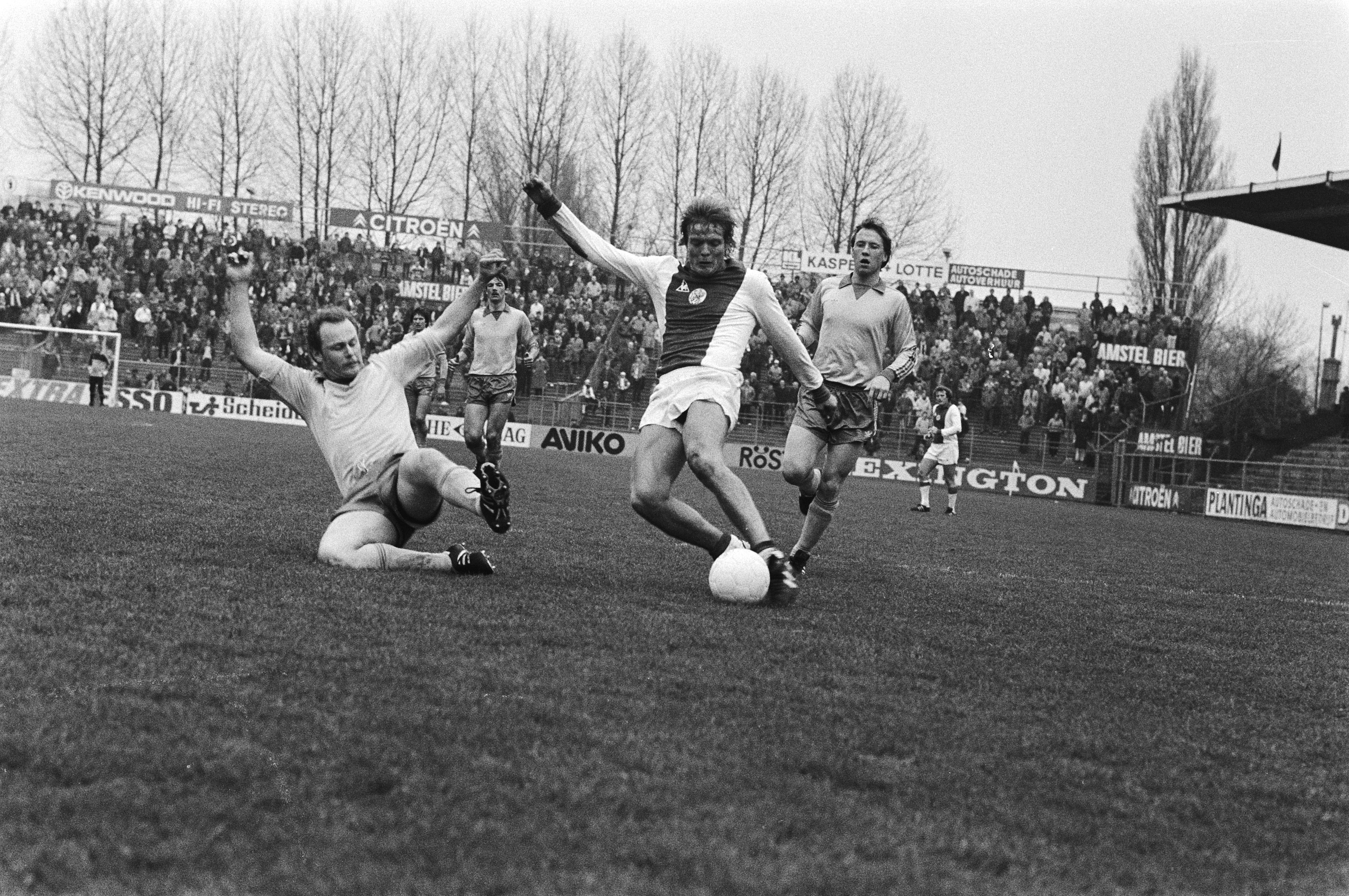 Collectie / Archief : Fotocollectie Anefo Reportage / Serie : [ onbekend ] Beschrijving : Voetbal Ajax tegen FC Den Haag 2-0, Lerby (r) in duel met Guido Pen. Datum : 5 april 1981 Locatie : Amsterdam, Noord-Holland Trefwoorden : sport, voetbal, wedstrijden Persoonsnaam : Guido Pen, Lerby, Sören Instellingsnaam : FC Den Haag Fotograaf : Bogaerts, Rob / Anefo Auteursrechthebbende : Nationaal Archief Materiaalsoort : Negatief (zwart/wit) Nummer archiefinventaris : bekijk toegang 2.24.01.05 Bestanddeelnummer : 931-4163